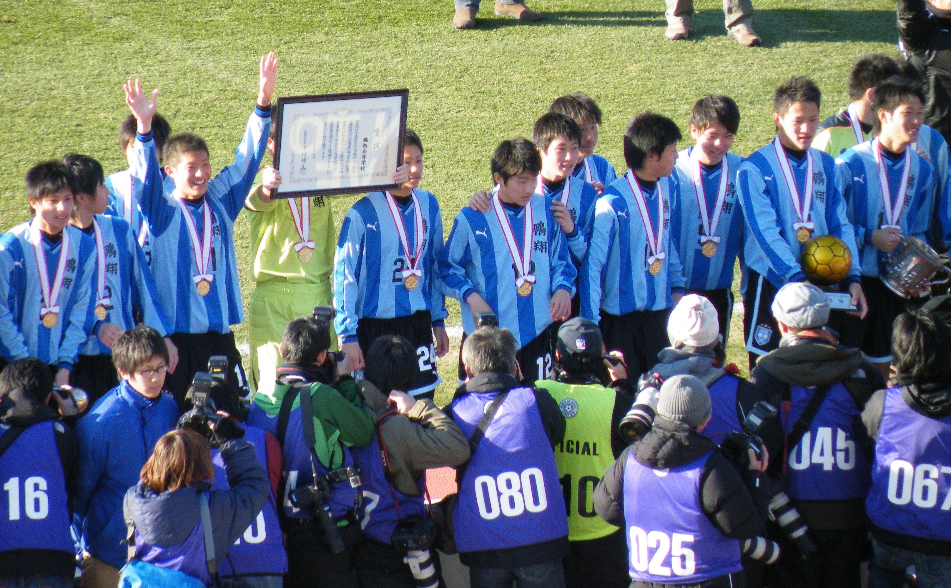 鵬翔高等学校（第91回全国高等学校サッカー選手権大会優勝時の写真）